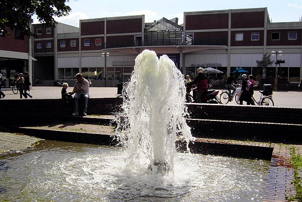 Wulfener Markt, Wassertreppe mit Springbrunnen